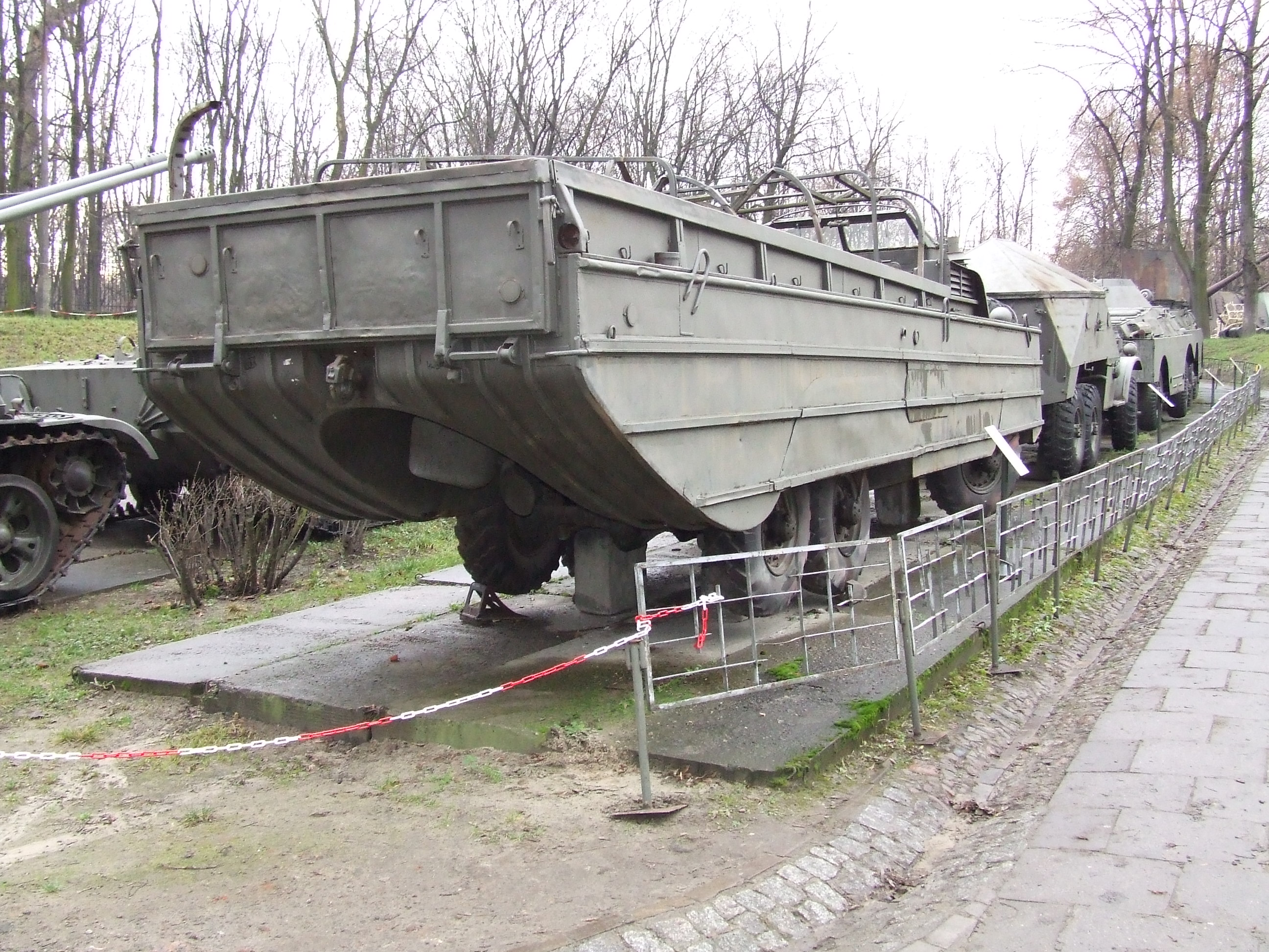 ZiL-485, Muzeum Wojska Polskiego, Warszawa